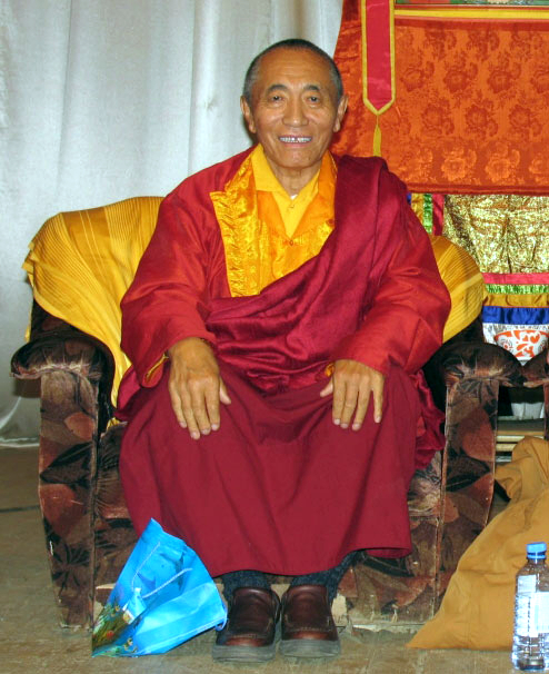 Khenchen Palden Sherab, Палден Шераб Ринпоче